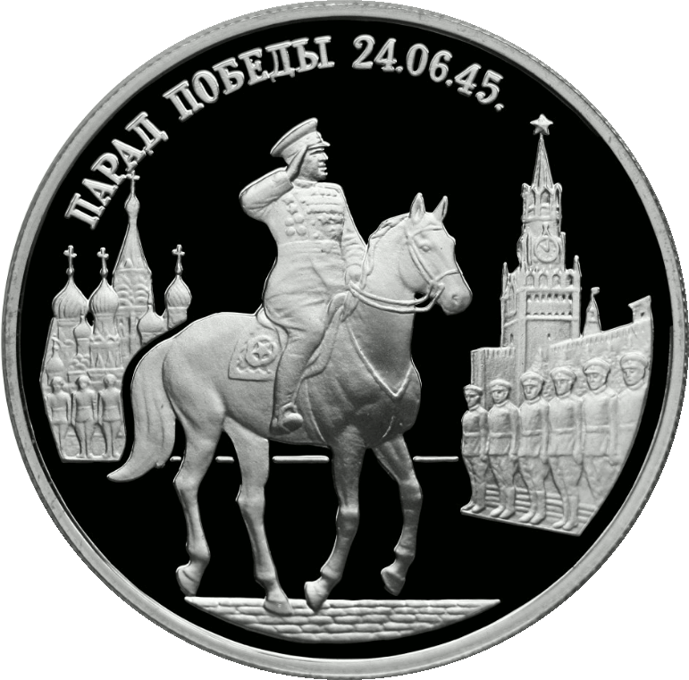 Монета Банка России — Серия: «Великая Отечественная война», 50-летие Победы в Великой Отечественной войне 1941—1945 гг., Парад Победы в Москве, Маршал Жуков на Красной площади в Москве, 2 рубля, реверс.